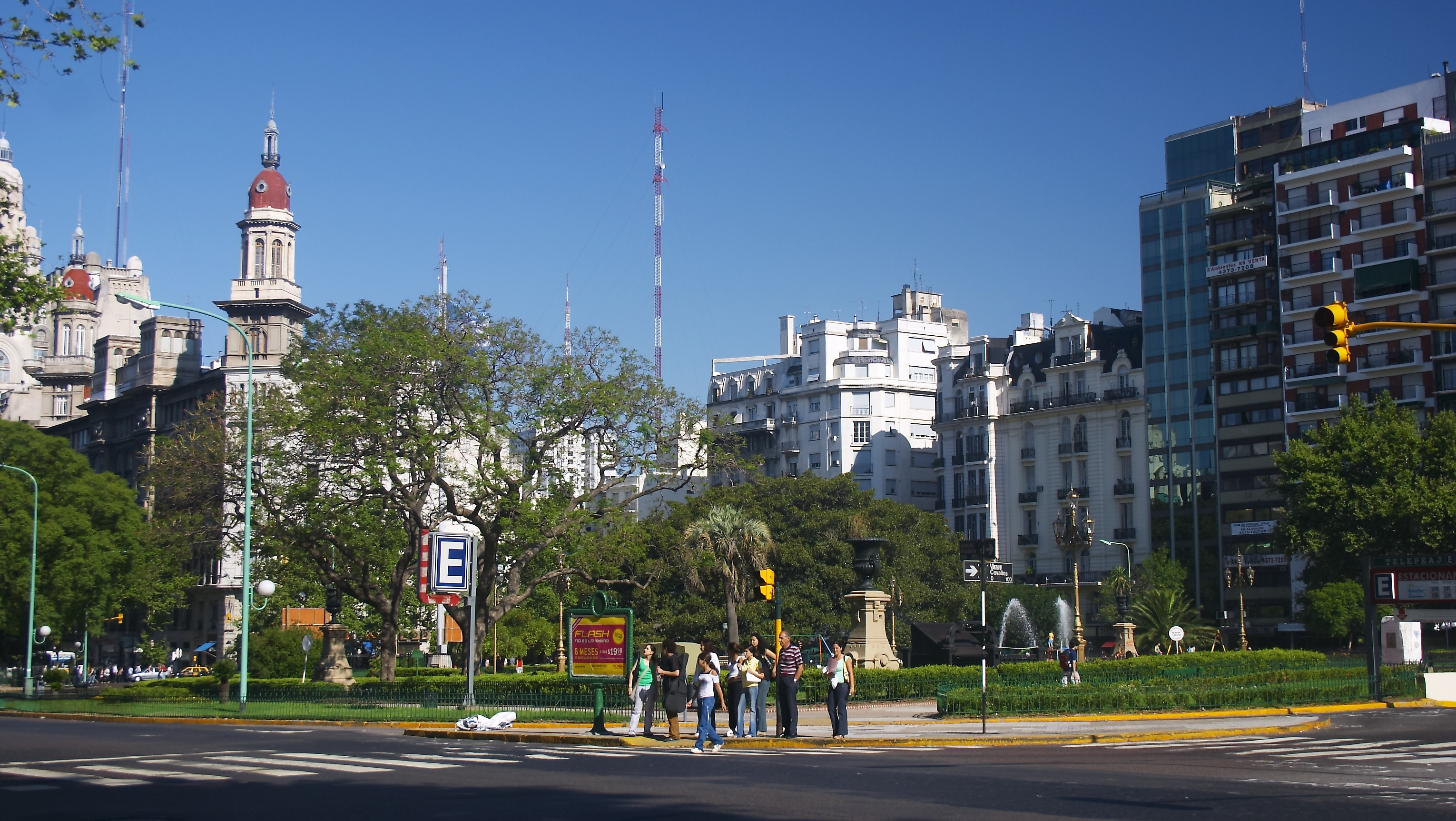 Plaza Mariano Moreno vista desde la esquina de Rivadavia y Virrey Cevallos, Monserrat, Buenos Aires, Argentina.